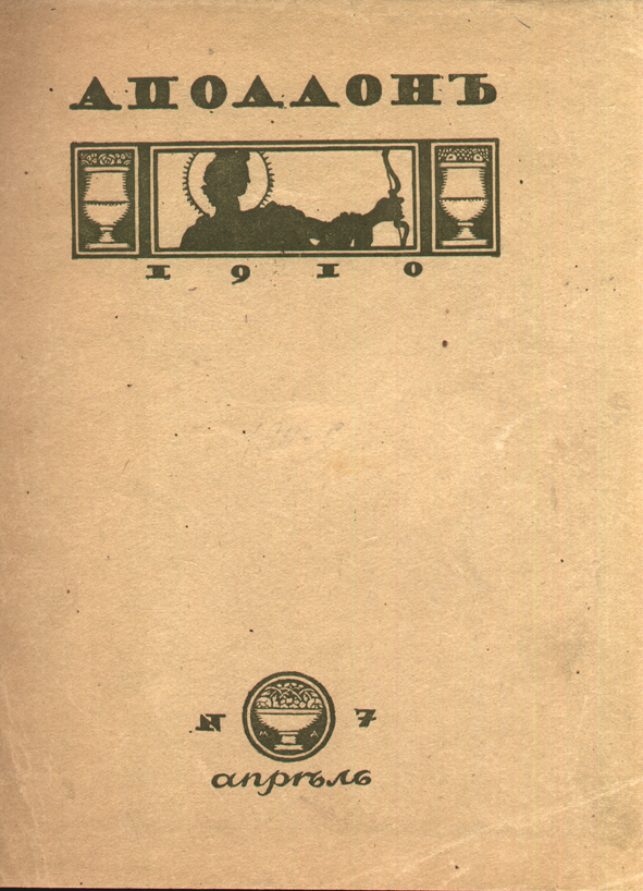 "Аполлон", обложка журнала 1910 г.